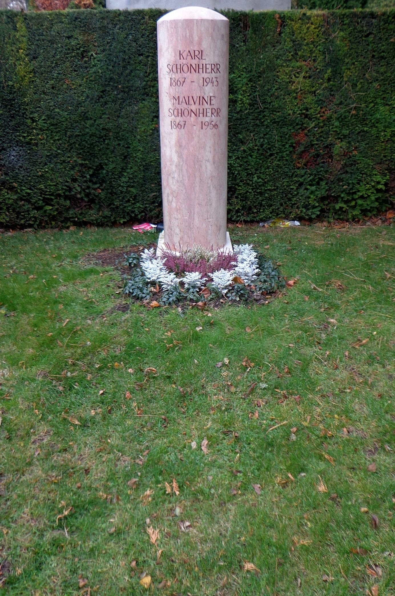 Wiener Zentralfriedhof - Gruppe 14 C, Ehrengrab von Karl Schönherr